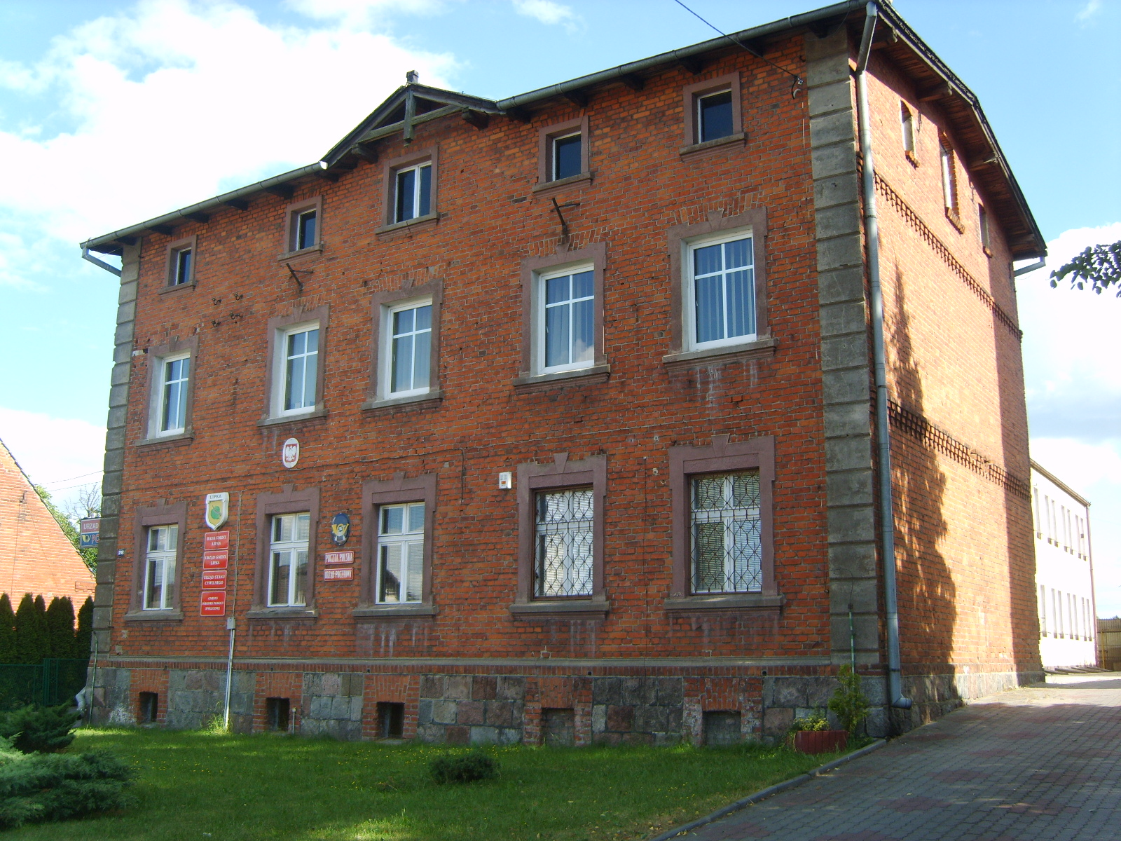 Urząd gminy w Lipce.